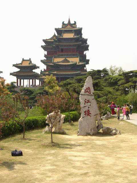 阅江楼 閲江楼 2004年4月16日撮影 撮影者：権作 参照：